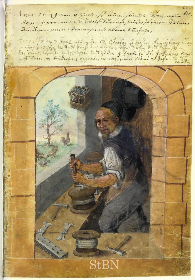 Transkription und weitere Informationen Augustinus (Augustinus; August; Augustus) Bachmayr; Bachmayer (Bachmayer; Bachmeyer), Koppenschoper (Koppenschopper; Kapaunmäster; Drahtzieher)